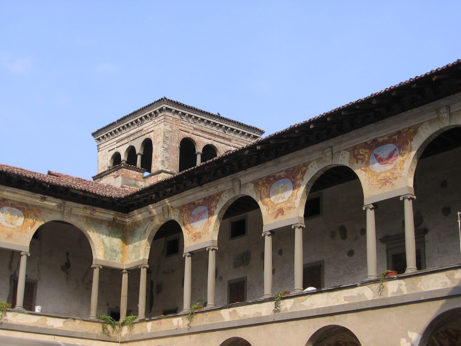 Castello di Cavernago, Bergamo, Italia